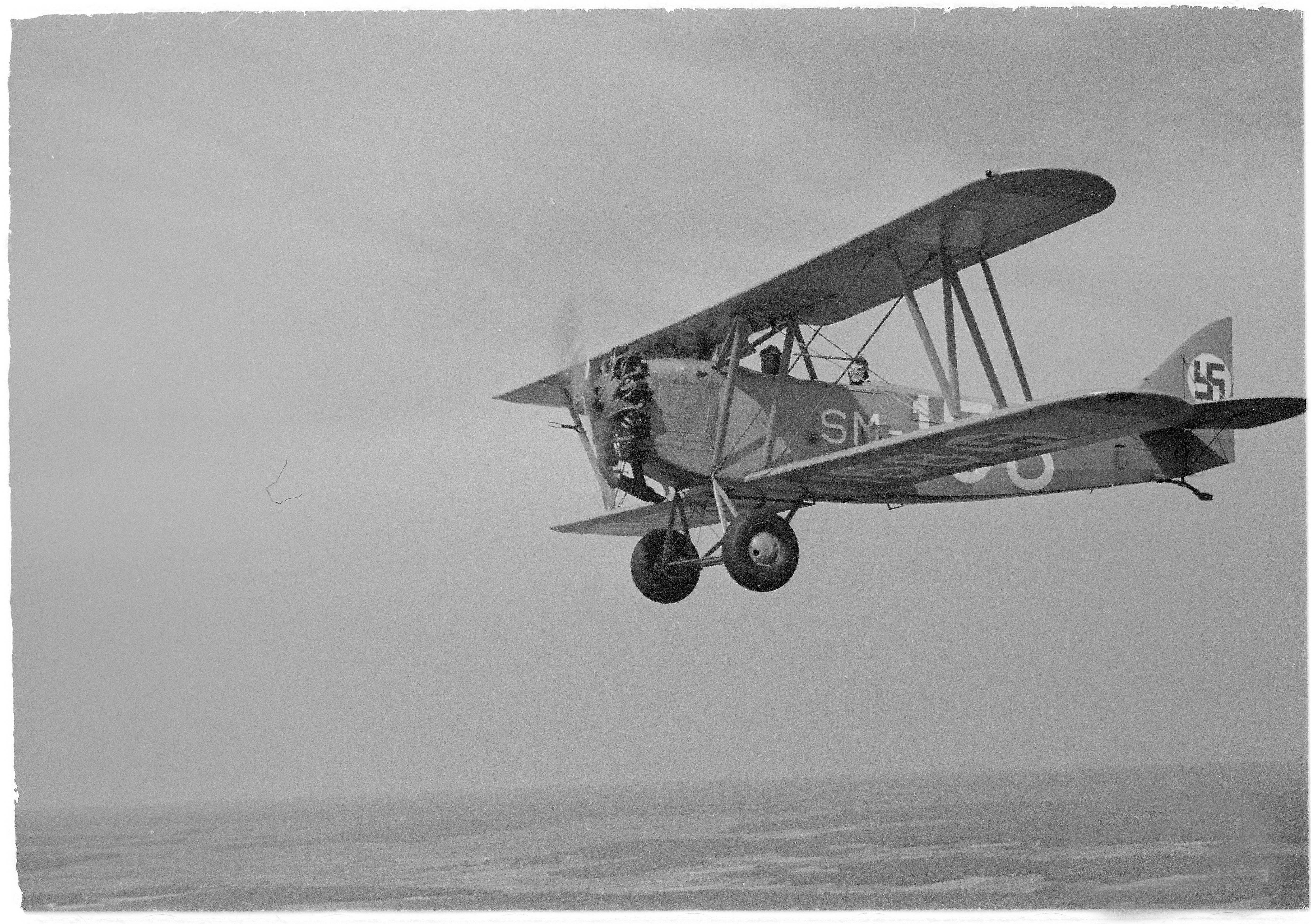 LeSK:n koulukone Smolik ilmassa valokuvattu toisesta koneesta. (Kuvassa on Letov Š-218A koulukone). Kuvauspaikka: Kokkola-Kauhava